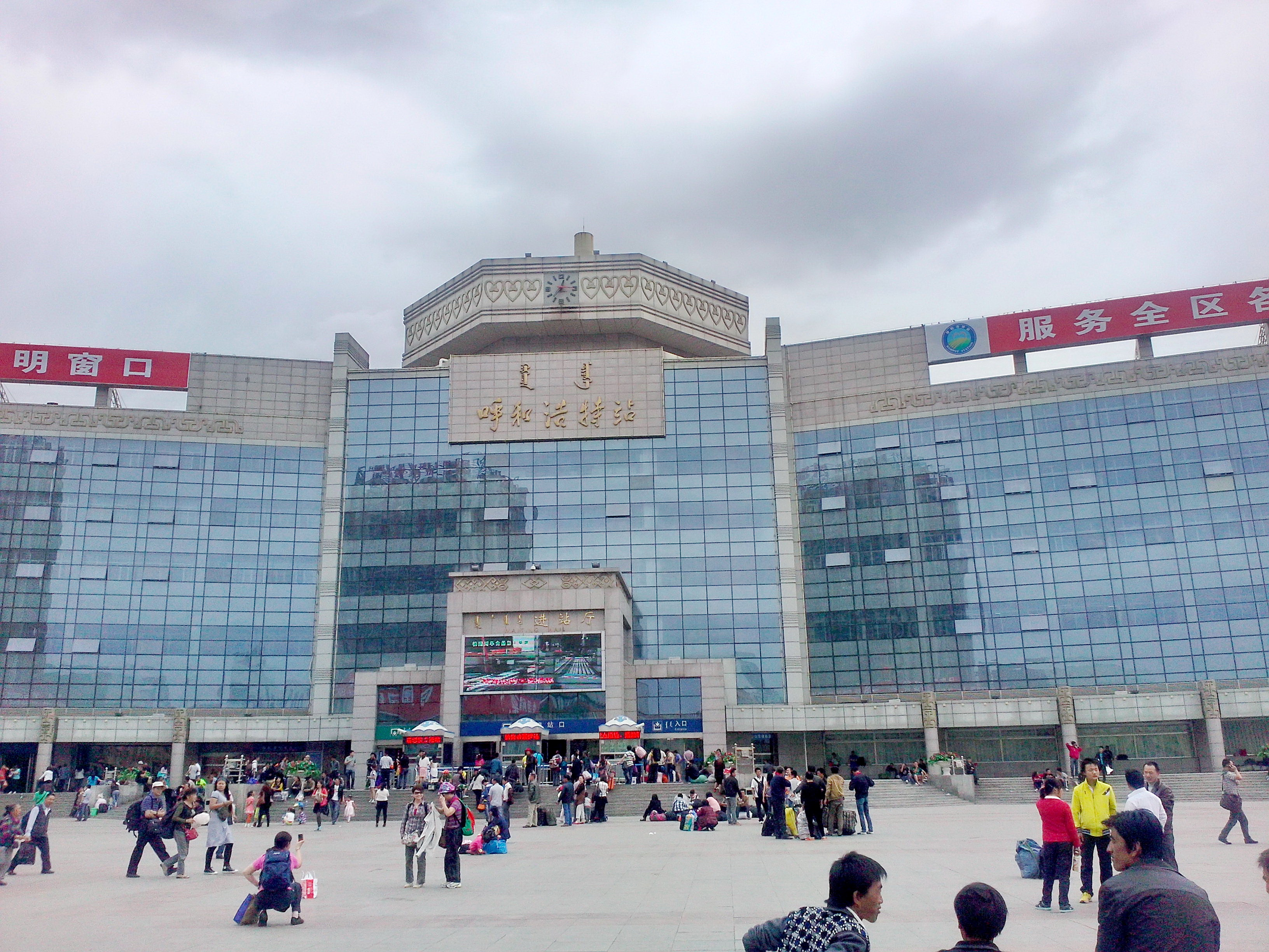 呼和浩特火車站